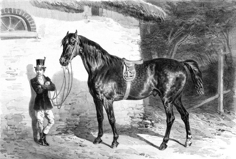 Anglo-normand du Merlerault (vers 1850)